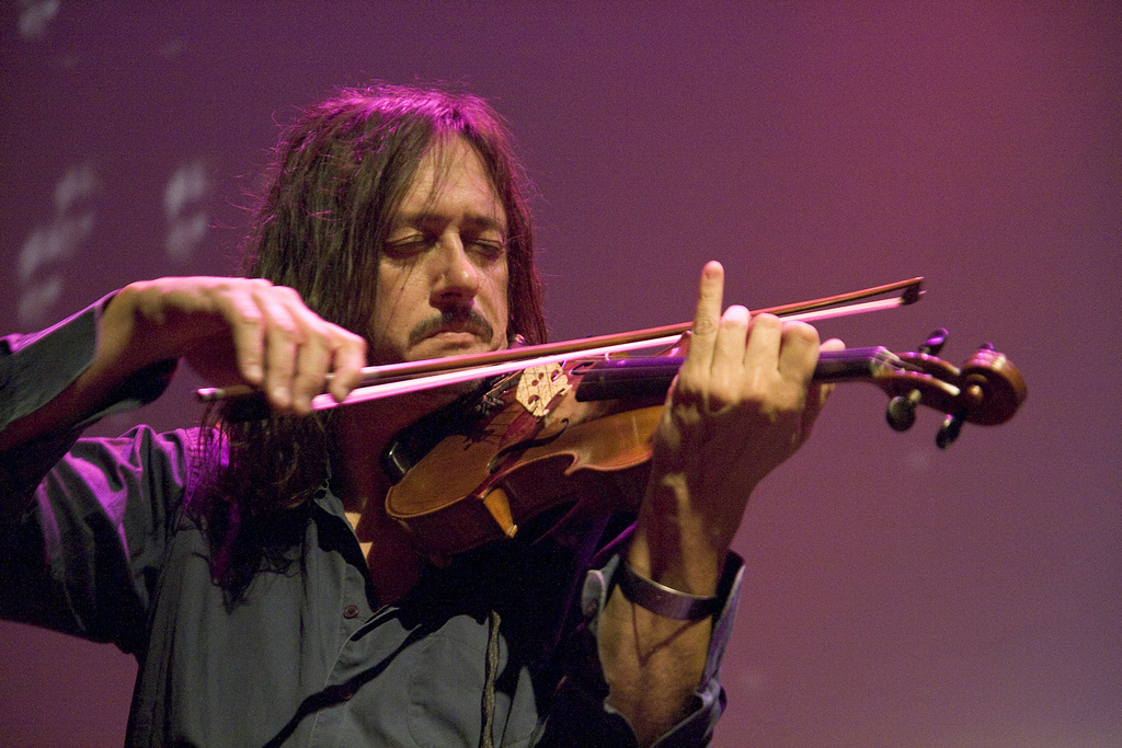 Domnique Pifarely (violon) en concert au Studio de l'Ermitage (Paris) avec Nigma-e, le 4/10/2007